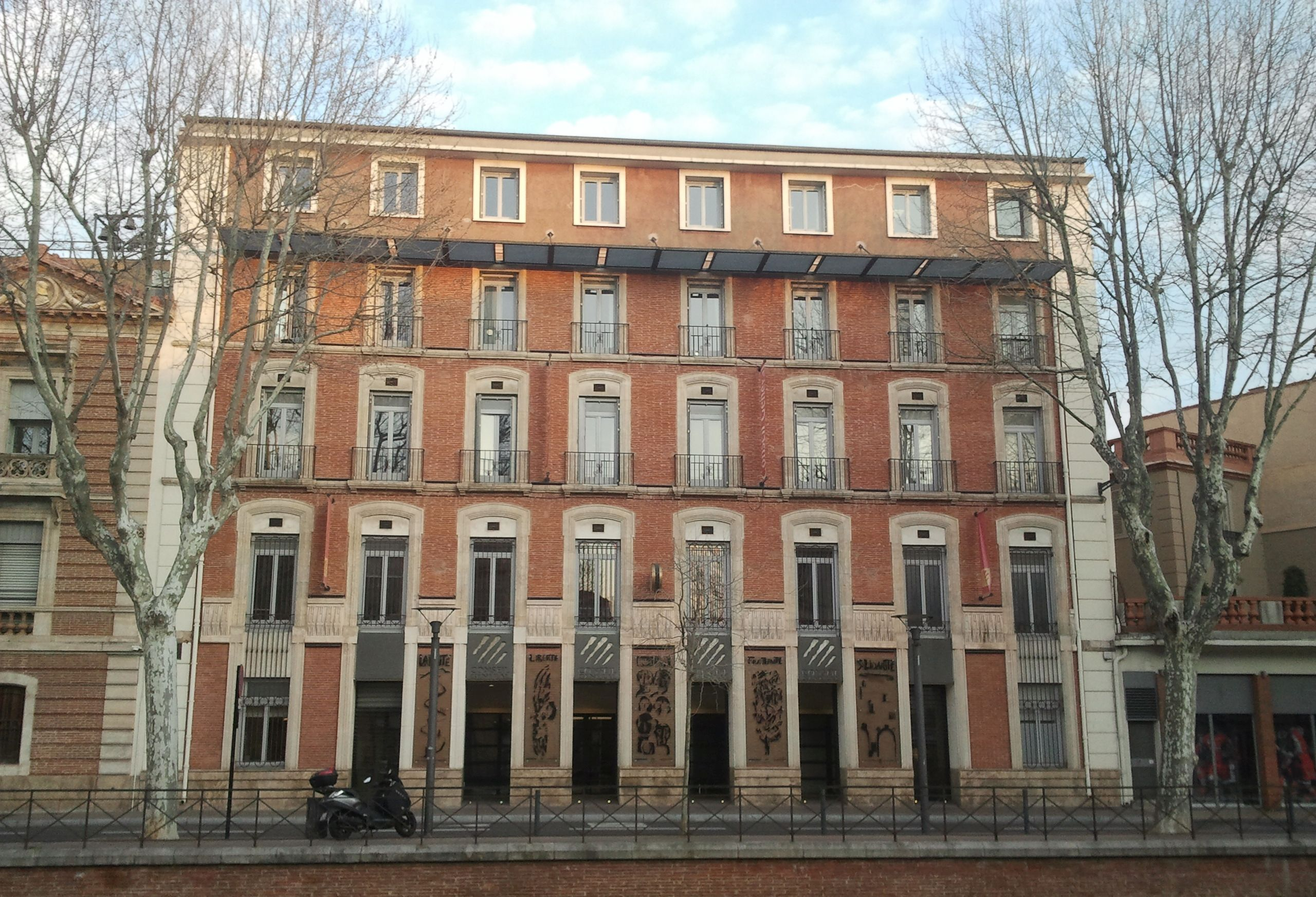 Bâtiment du Conseil départemental des Pyrénées-Orientales à Perpignan